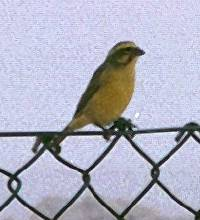 Voorbeeld ruis verminderen. Bewerkt detail van foto.